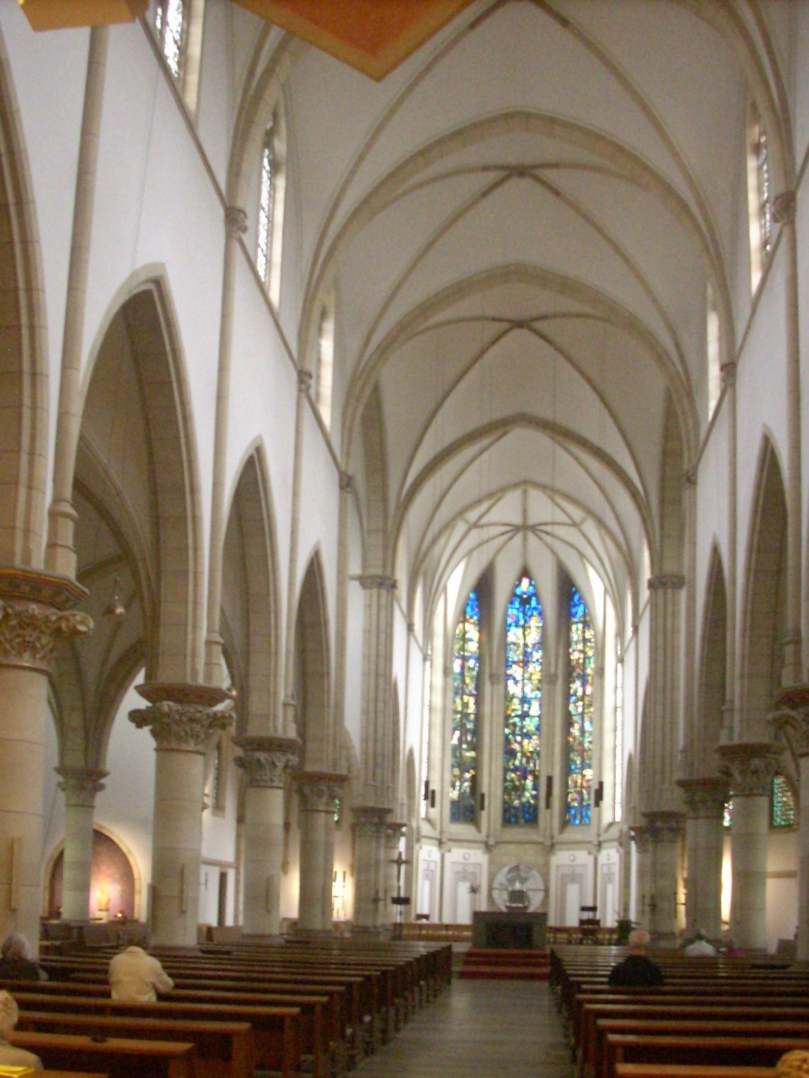 Gelsenkirchen, Propsteikirche St. Augustinus, Inneres